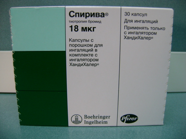 Спирива, капсулы с порошком